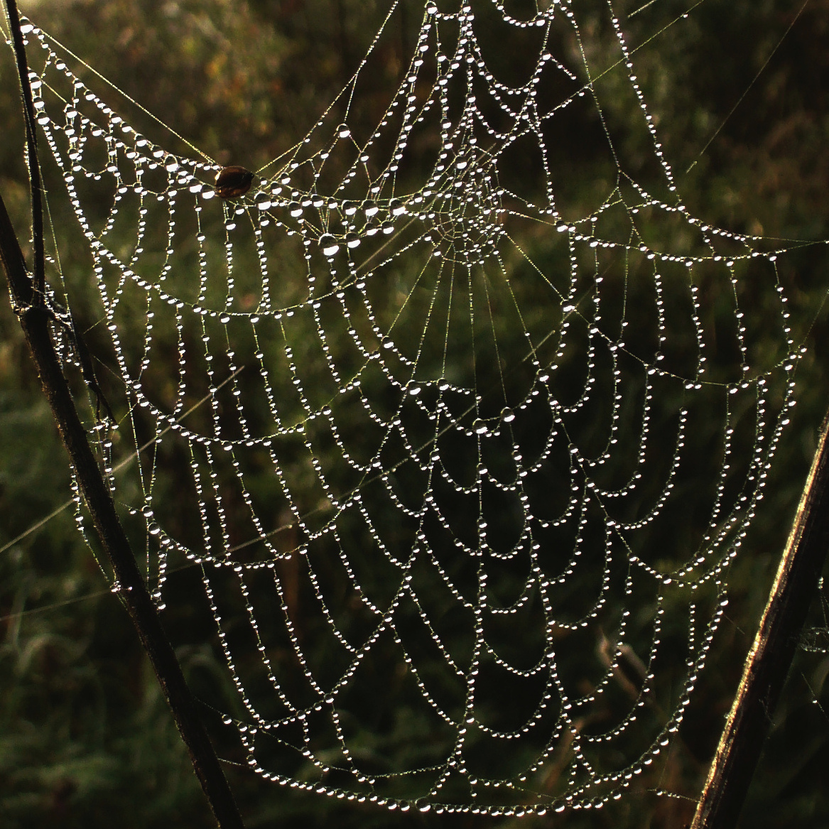 Капли росы на паутине